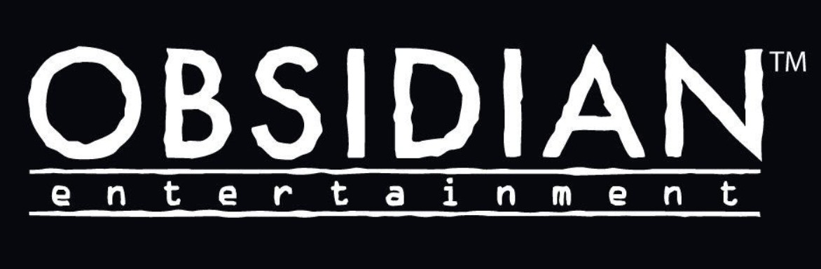 logo